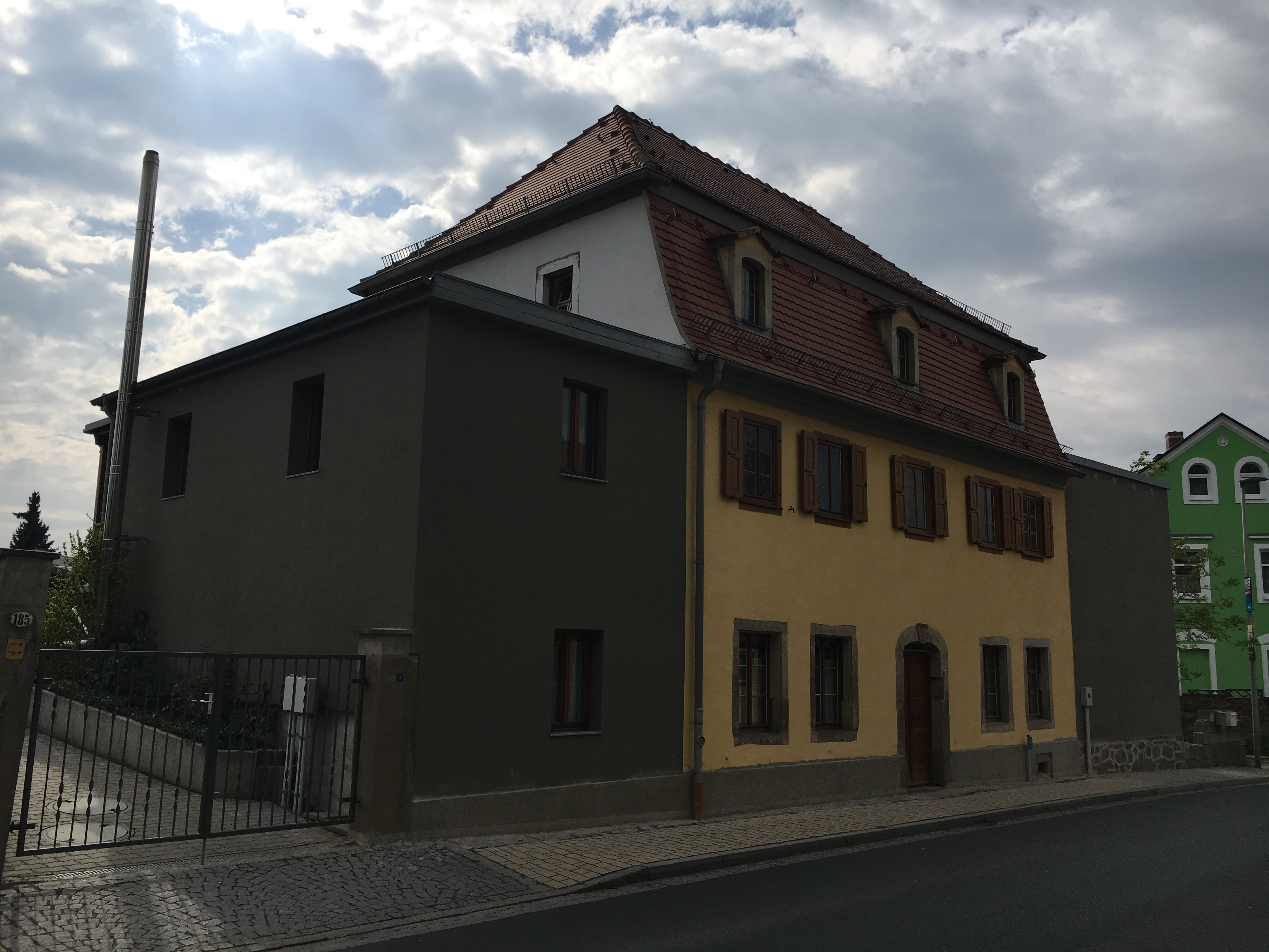 Radebeul, Wohnhaus Kötzschenbrodaer Straße 187a